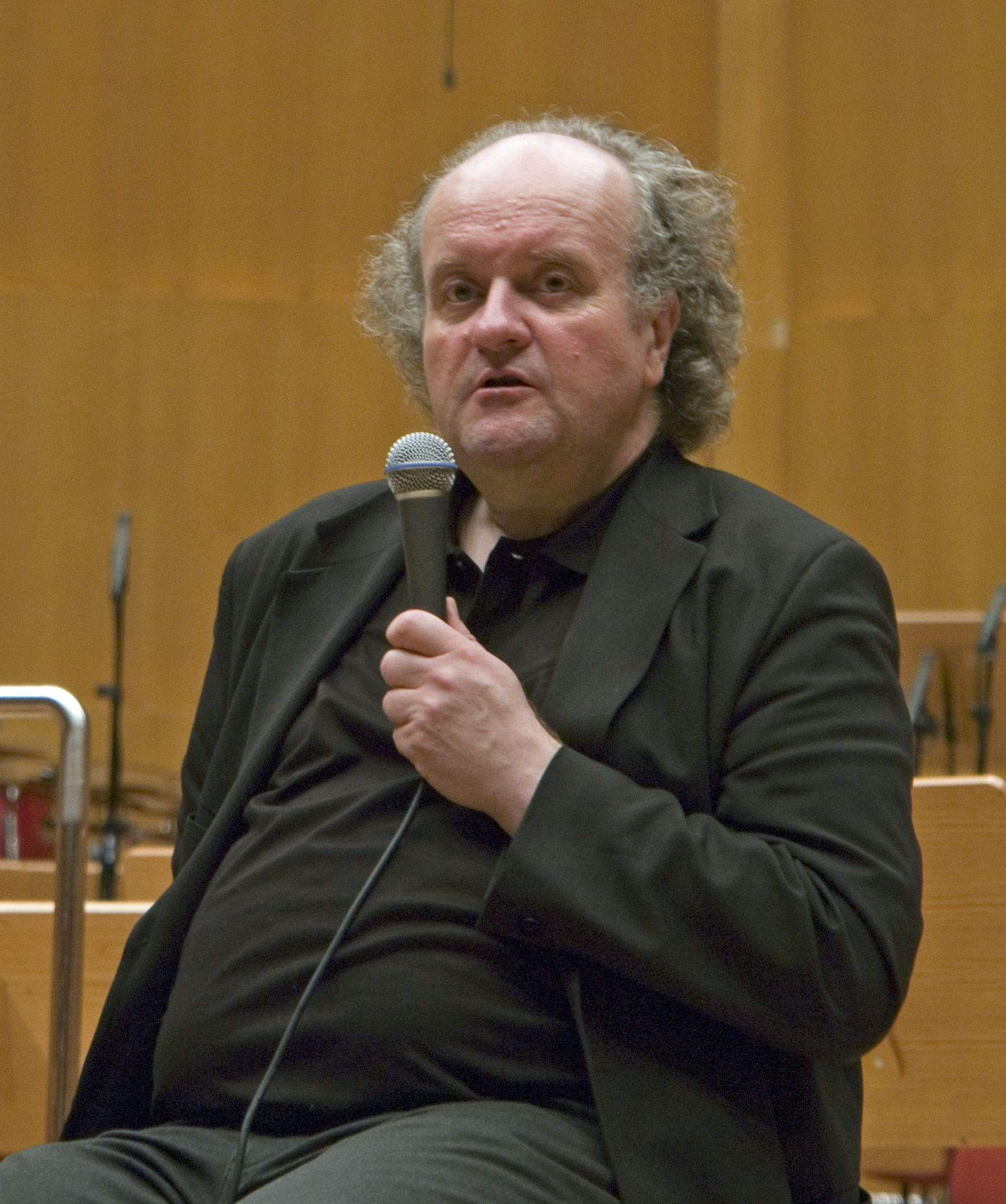 Wolfgang Rihm, Deutscher Komponist (anlässlich der Uraufführung von "Diptychon für Sopran und Orchester", 8. Juni 2007, Philharmonie Köln